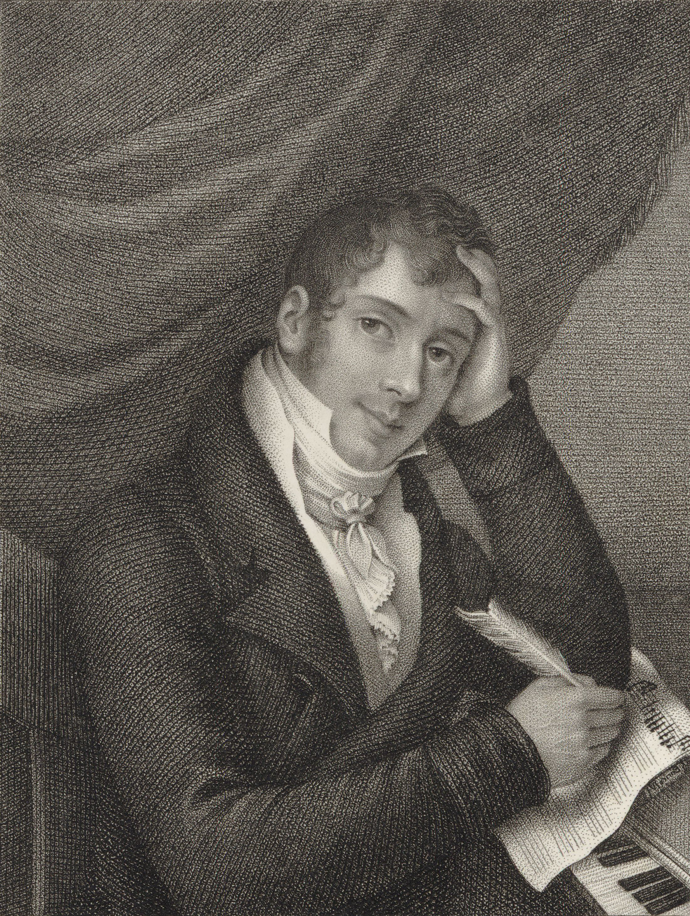 Maxim Gauci Vincenzo Pucitta 1812; engraver James Anthony Minasi H Beard Print Collection